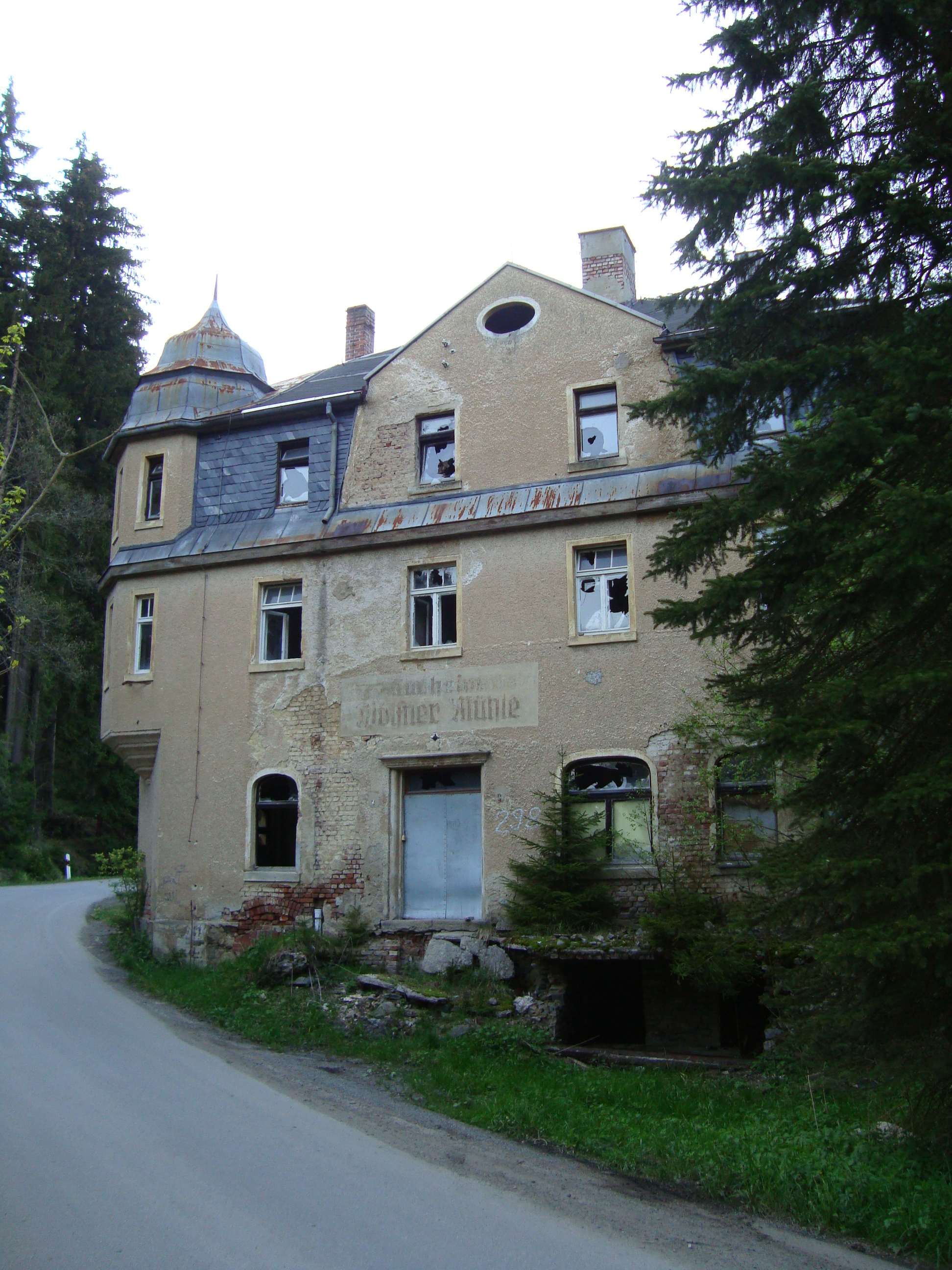 Wolfner Mühle im Erzgebirge